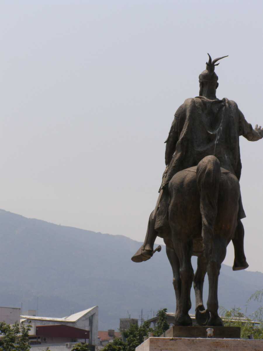 Паметник на Скендербей в Скопие, Република Македония.